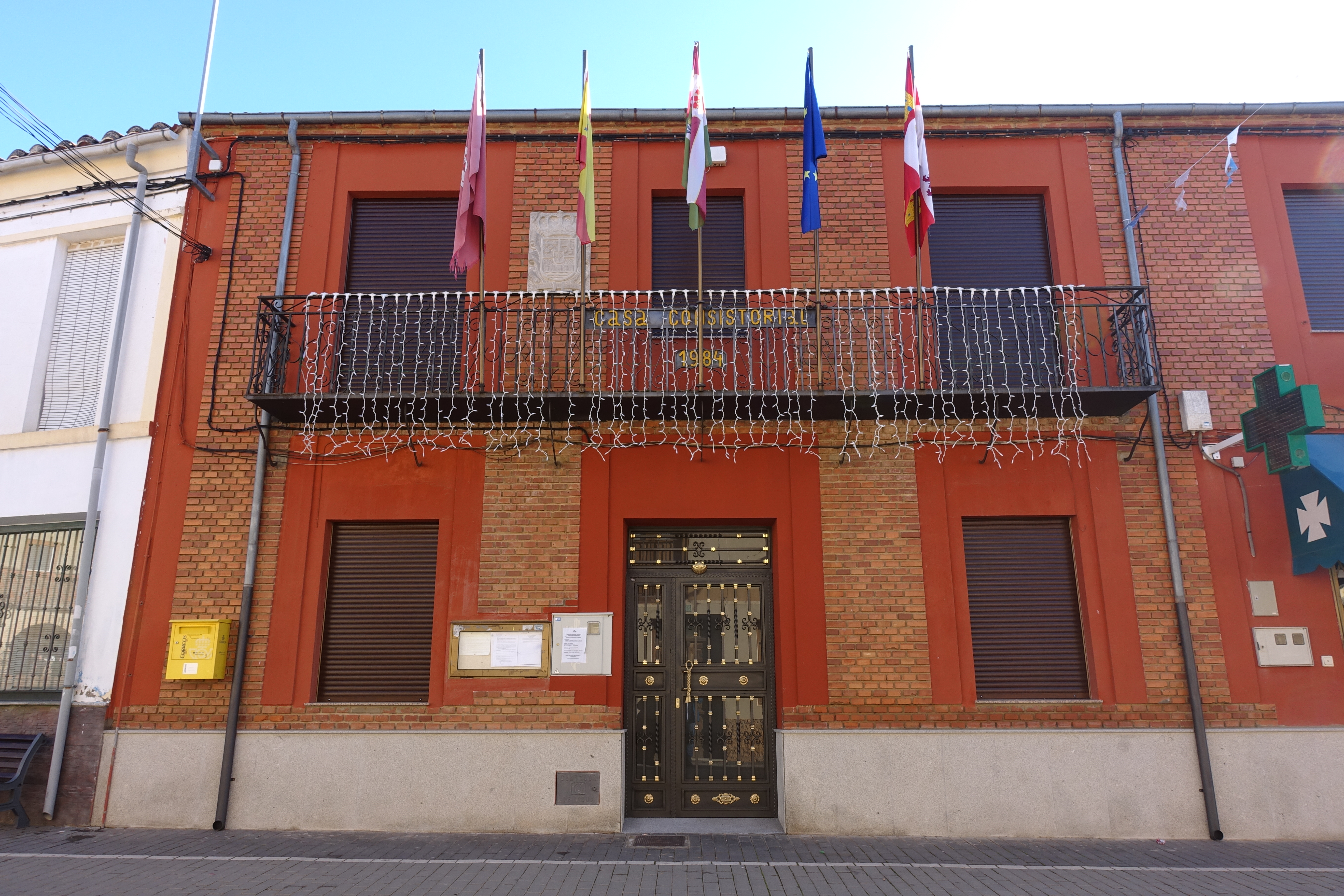 Casa consistorial de Villares de Órbigo (León, España).